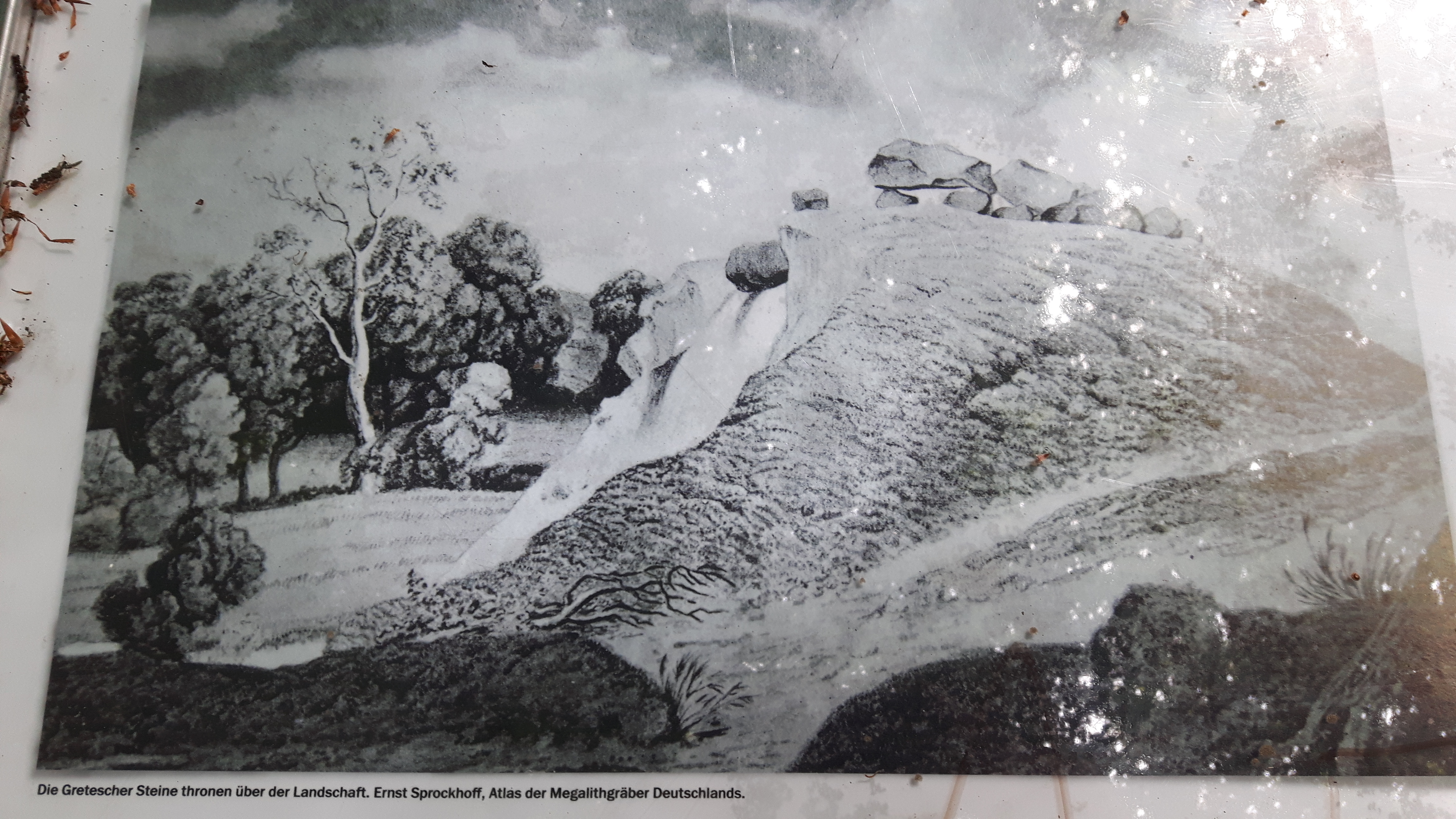 Afbeelding van het hunebed in het verleden